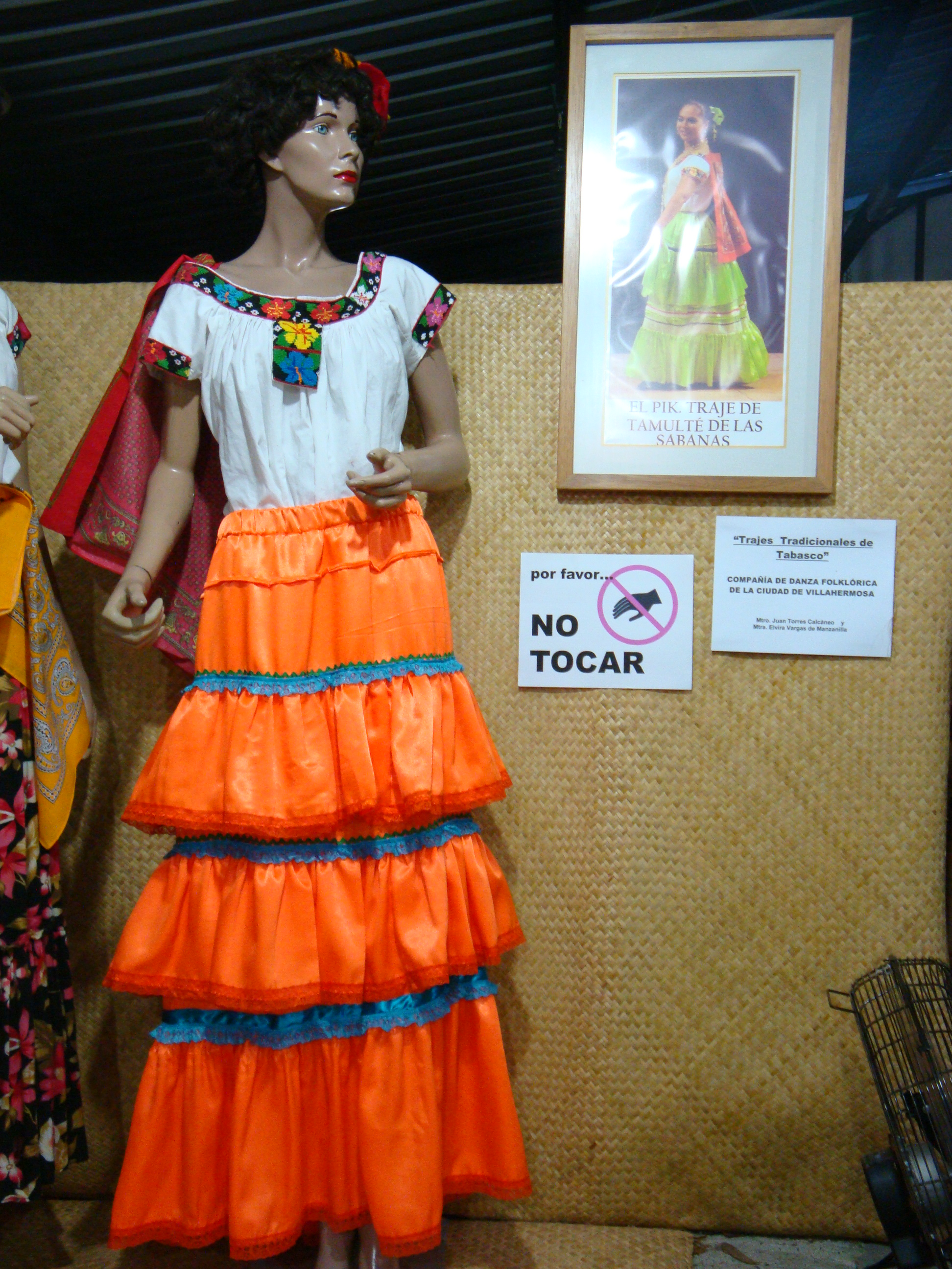 También llamado "Pik", es el traje tradicional de la población de Tamulté de las Sabanas, municipio de Centro, estado de Tabasco, México. Compañía de Danza Folklórica de la ciudad de Villahermosa.